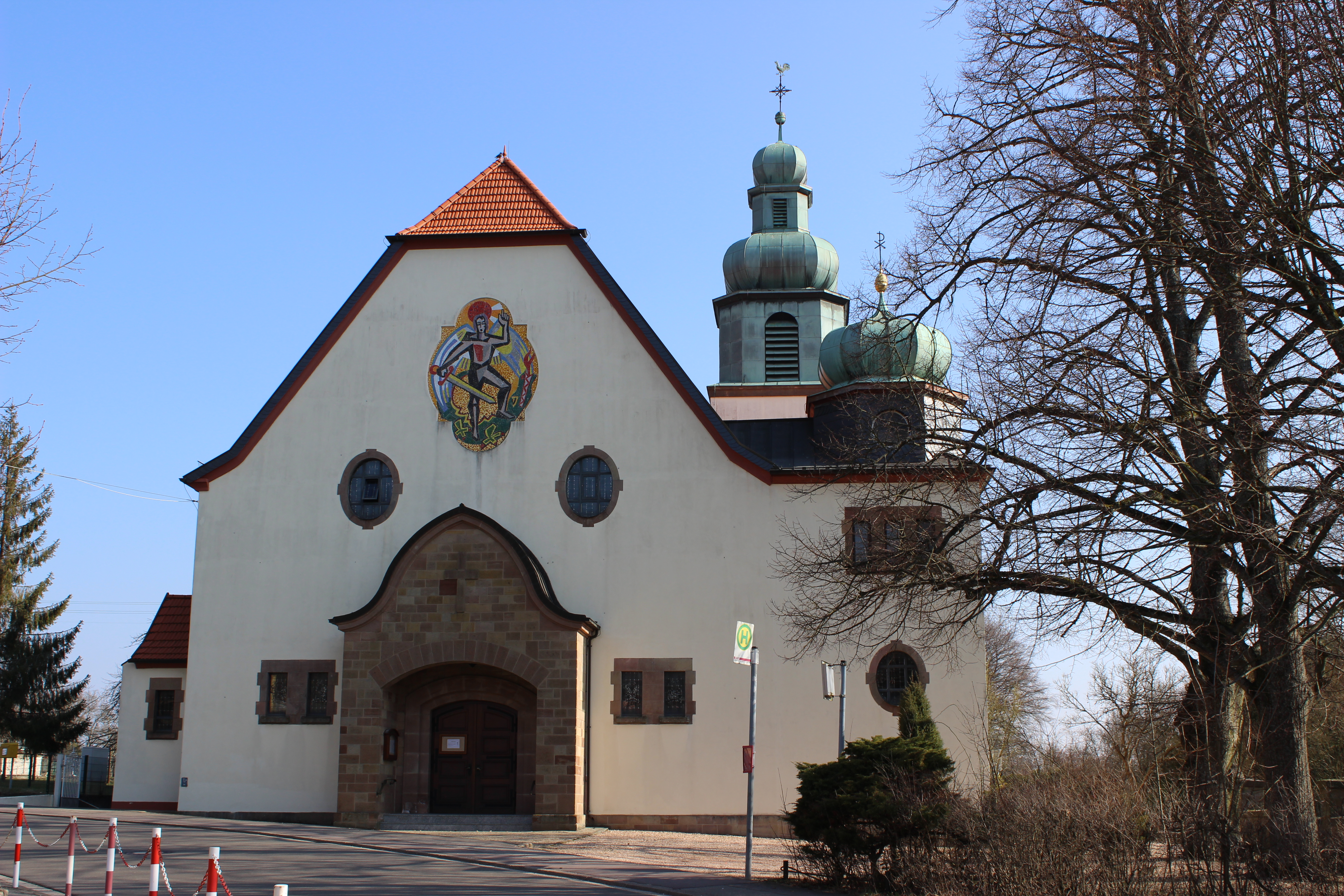 Die katholische Pfarrkirche St. Josef in Ballweiler, Saarland